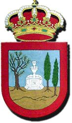 Escudo de Honrubia, en Cuenca (España)